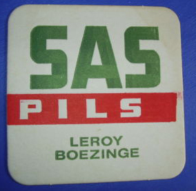 Bierviltje - Sas - Brouwerij Leroy - Boezinge - Ieper - West-Vlaanderen - België